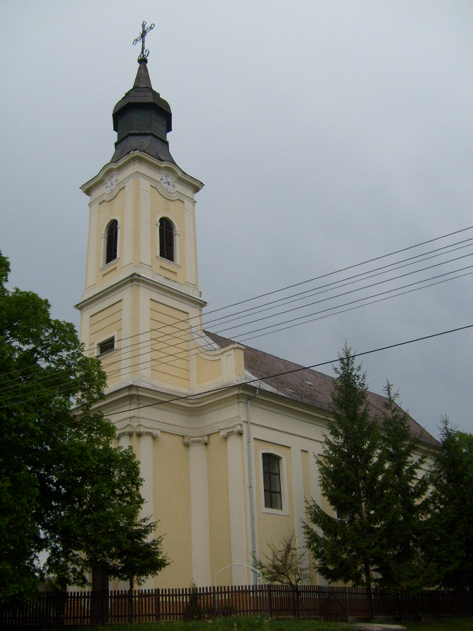 Bánhorváti római katolikus temploma